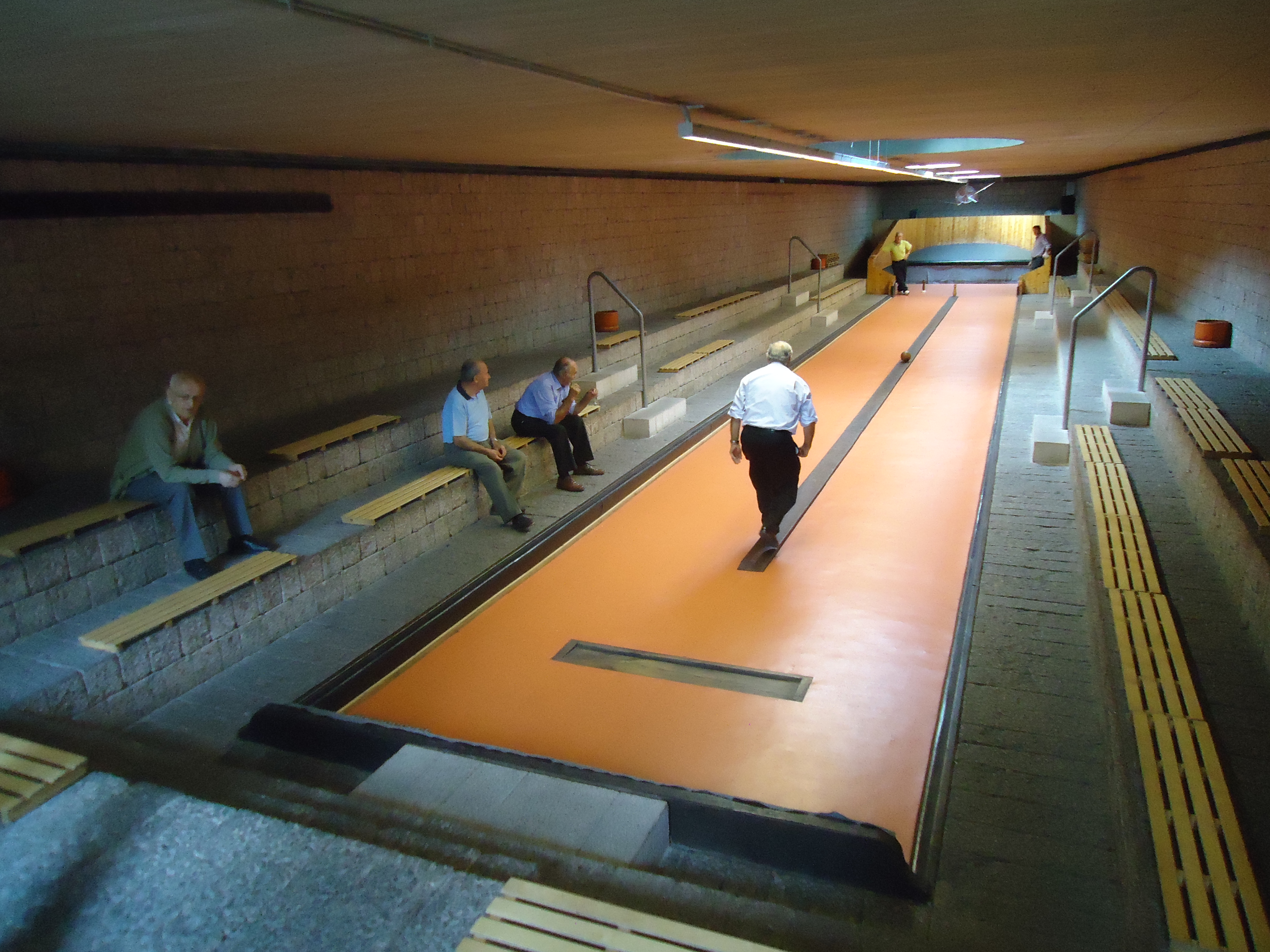 Arabar bola jokoa Gasteizko Foruen plazan 1